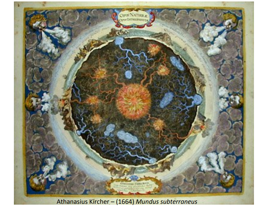 Scan du Mundus Subterraneus (1664) d'Athanasius Kircher